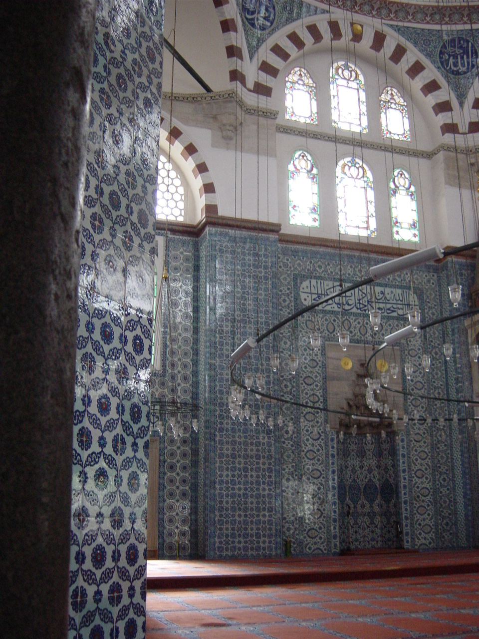 L'interno, interamente decorato in piastrelle in maiolica, per cui è celebre la piccola ma splendida moschea detta "Rüstem Pasha camii", ad Istanbul. Foto di: Giovanni Dall'Orto, 26-5-2006.